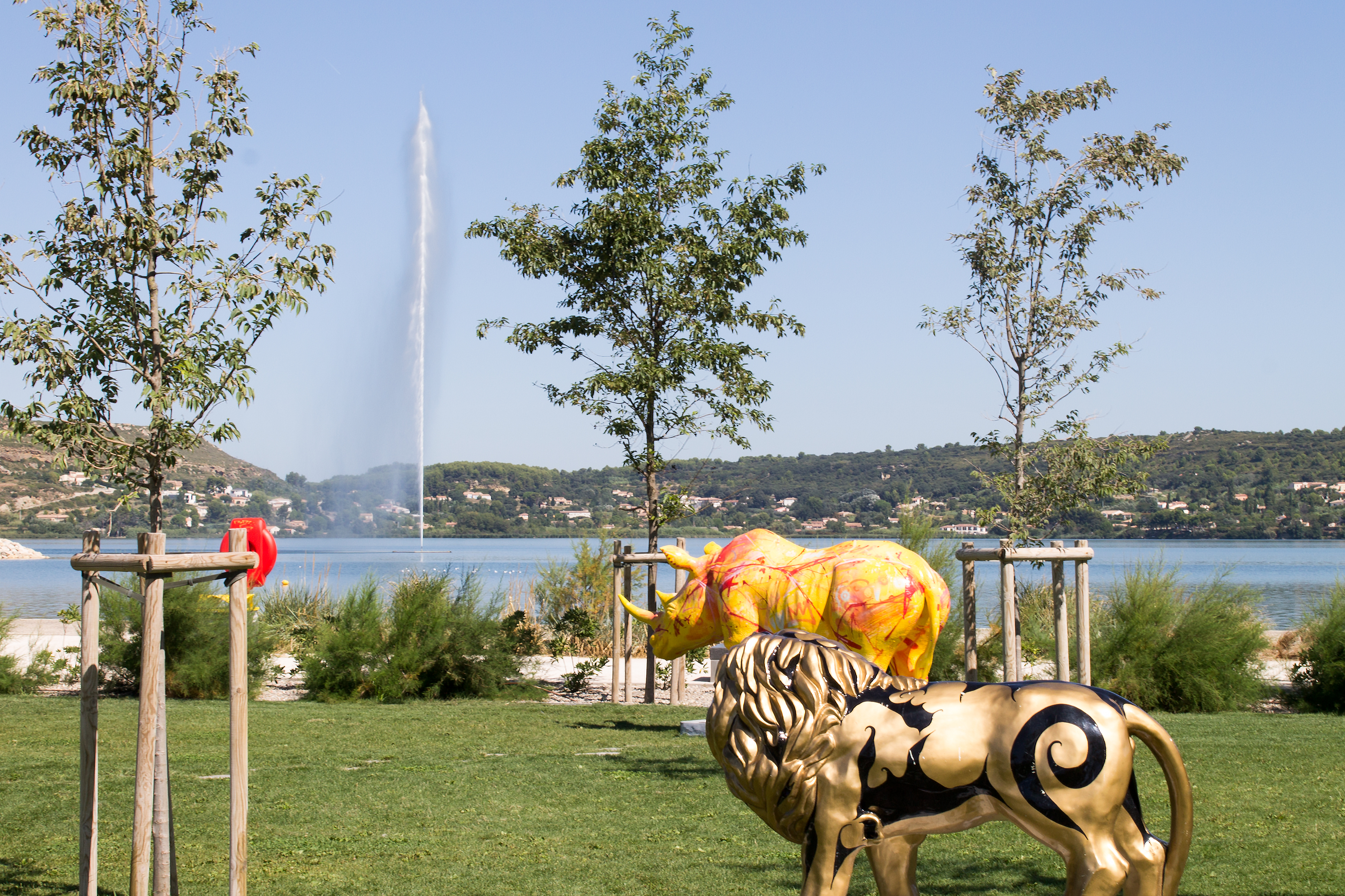 Aménagements sur les berges de l'étang de l'Olivier à Istres. Vue sur le jet d'eau.